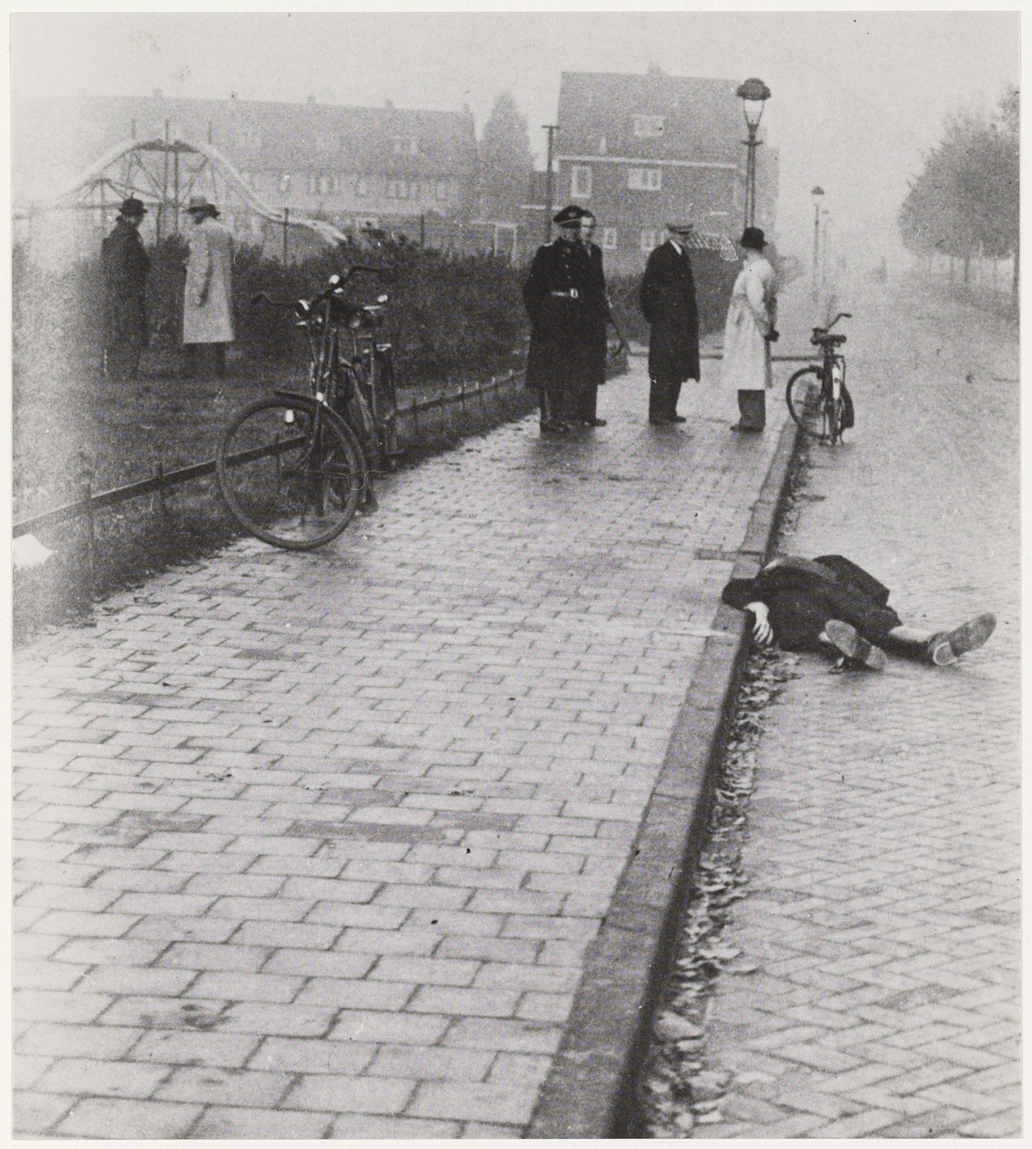 Op de Westergracht ligt de dode Fake Krist die door een aanslag van het verzet om het leven werd gebracht.